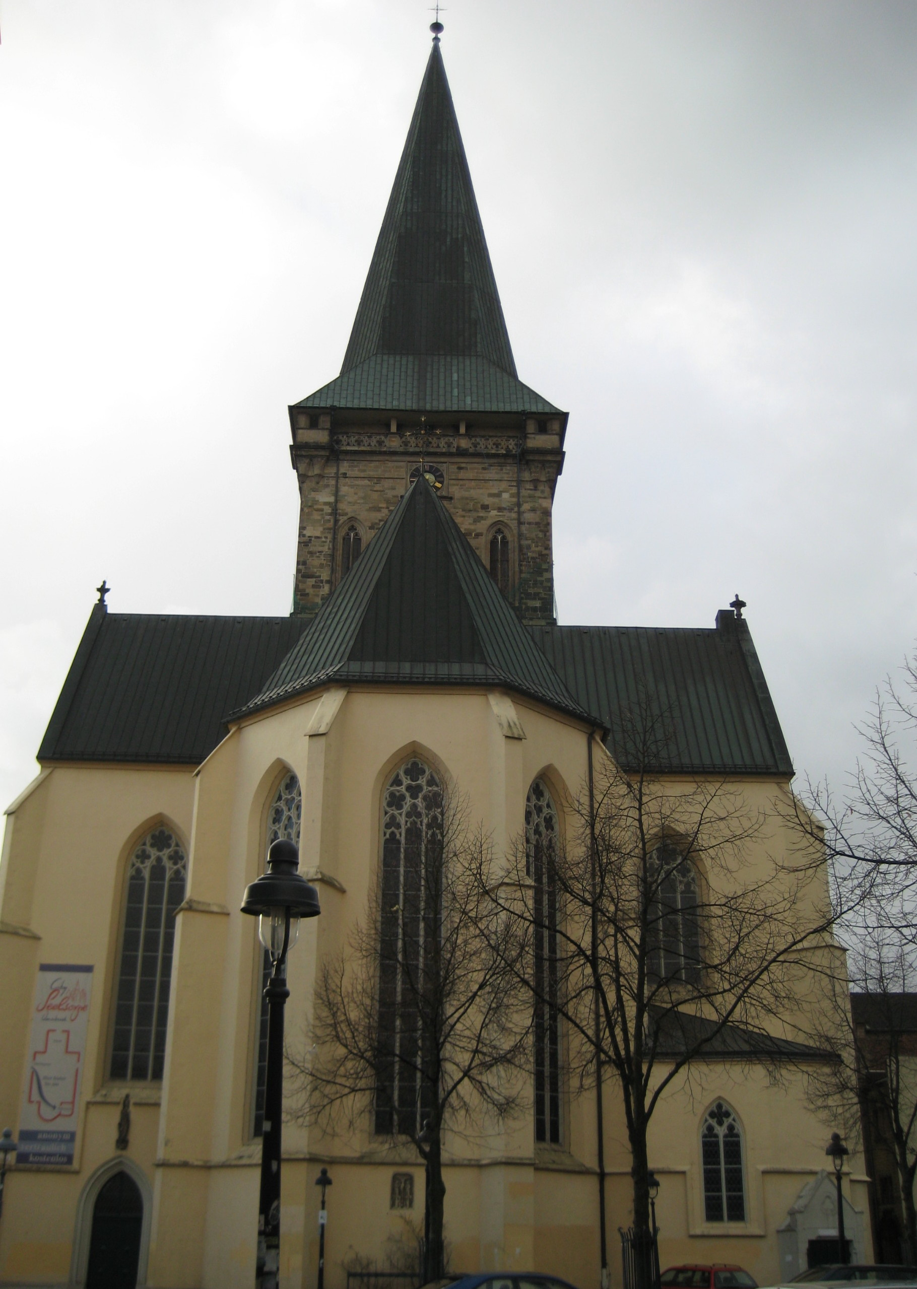 St. Katharinen